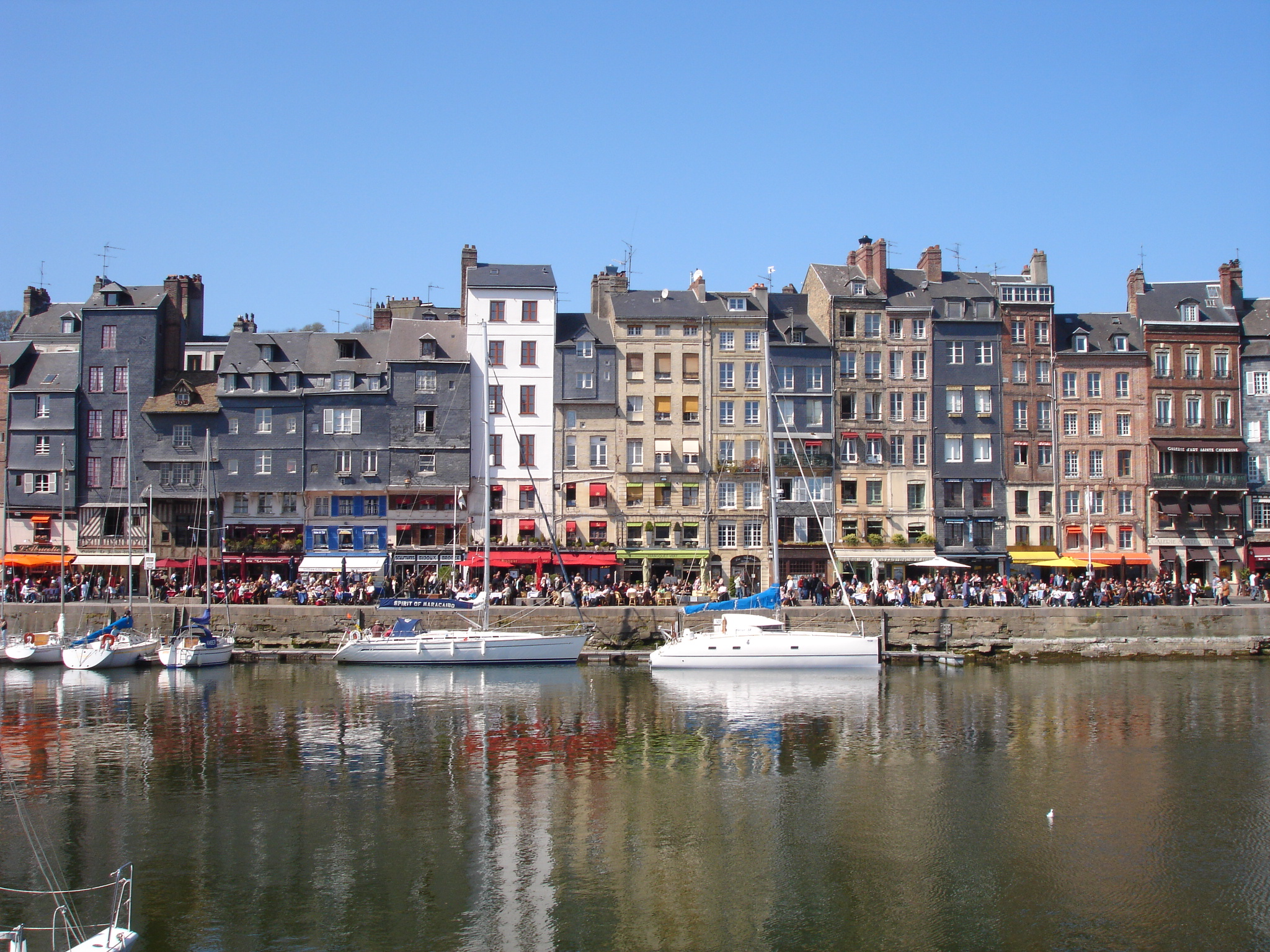 France, Calvados (14), Honfleur, port